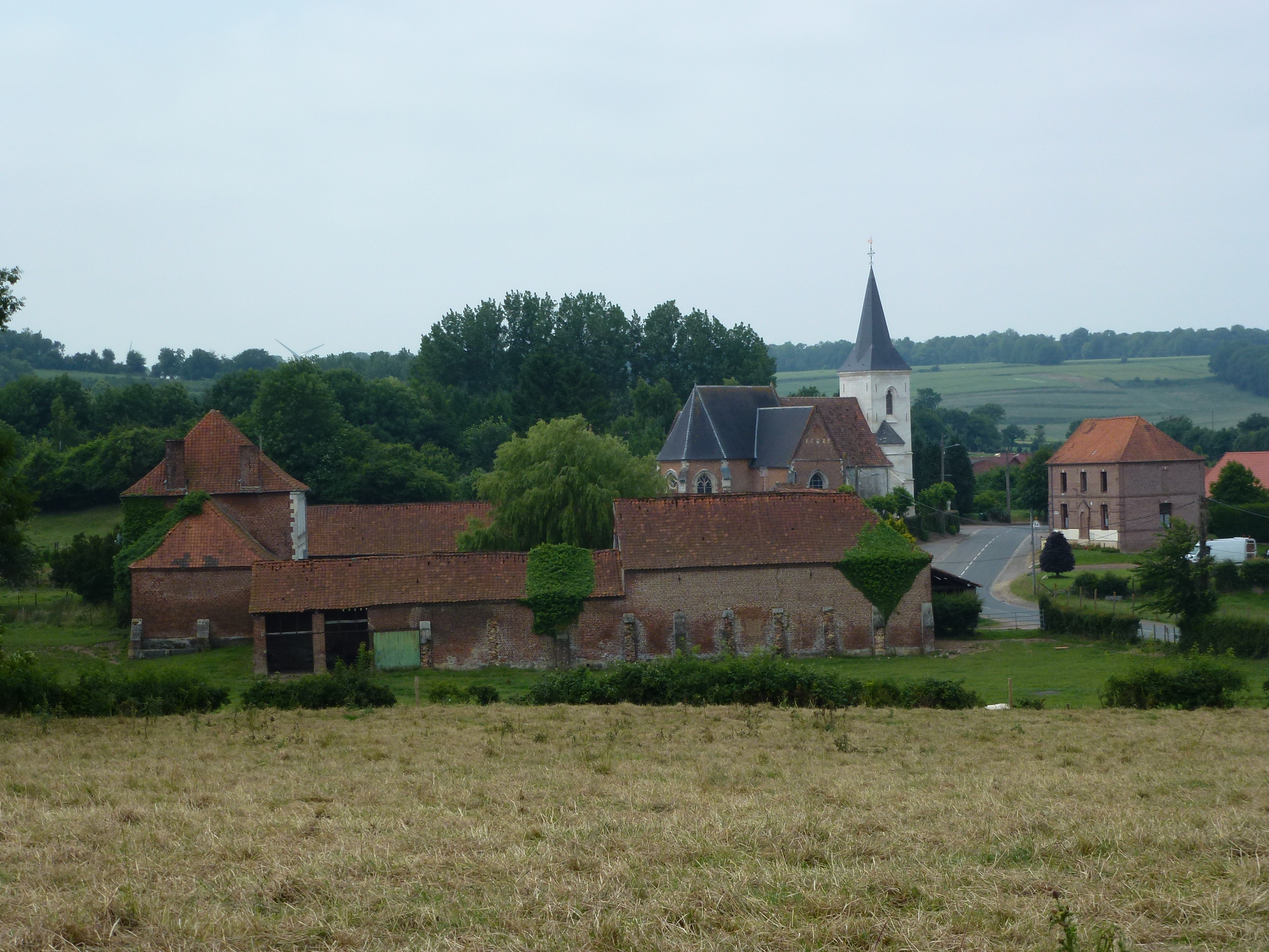 Bailleul-lès-Pernes (Pas-de-Calais, Fr) vue du village et son église PA00108188 .